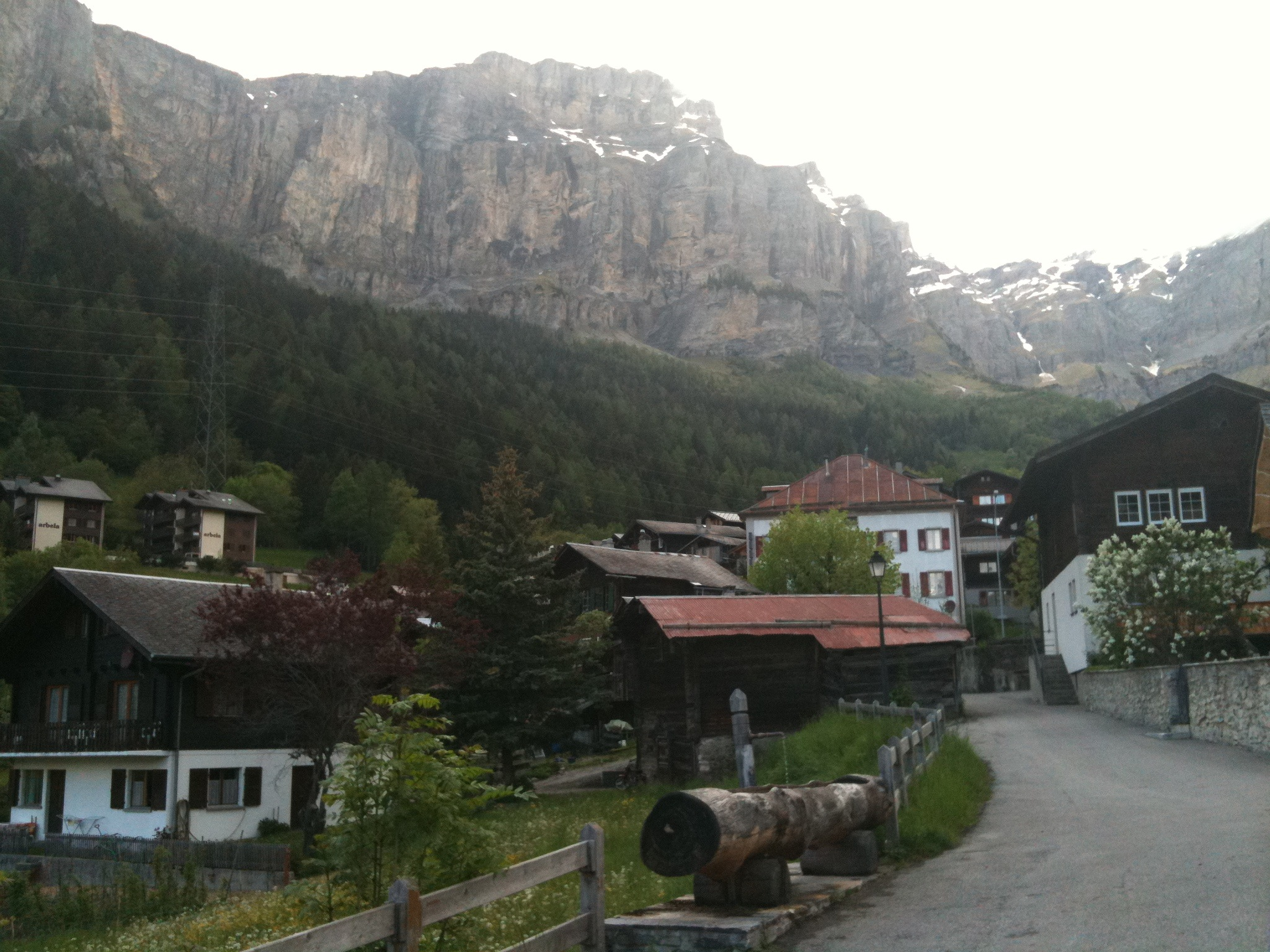 Inden VS, Kanton Wallis